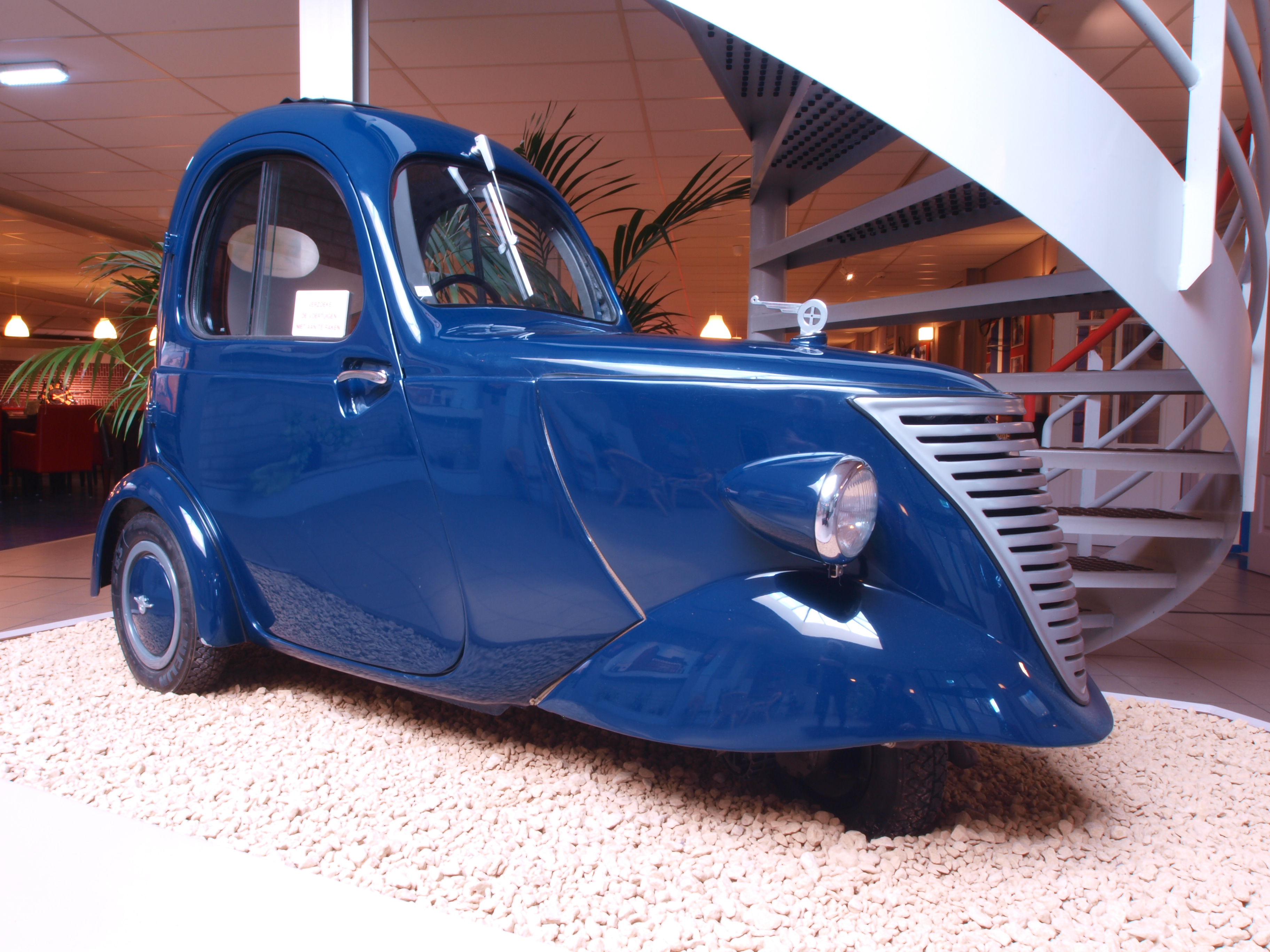 DAF museum